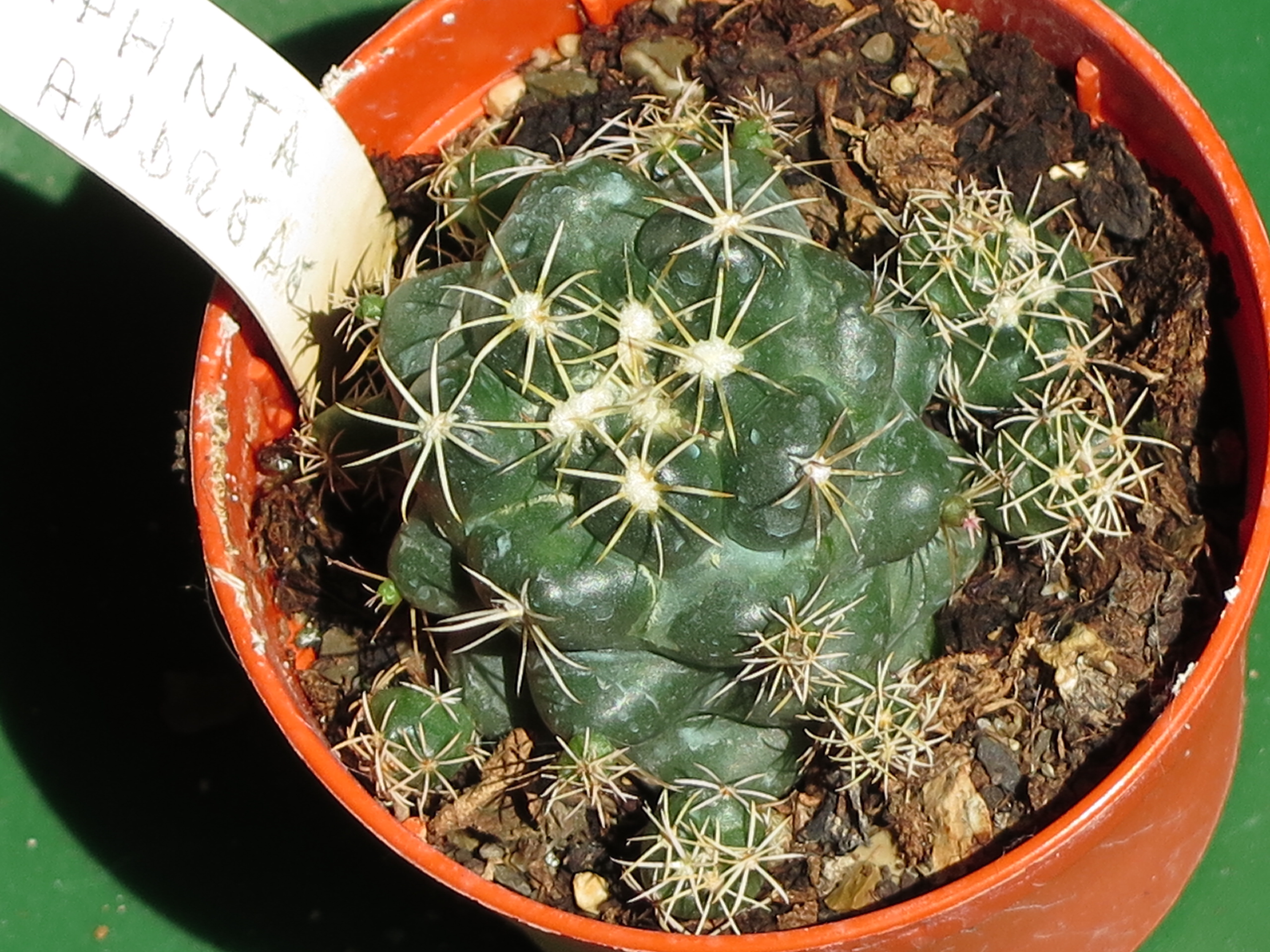 Coryphanta andreae /coryphantha pycnacantha